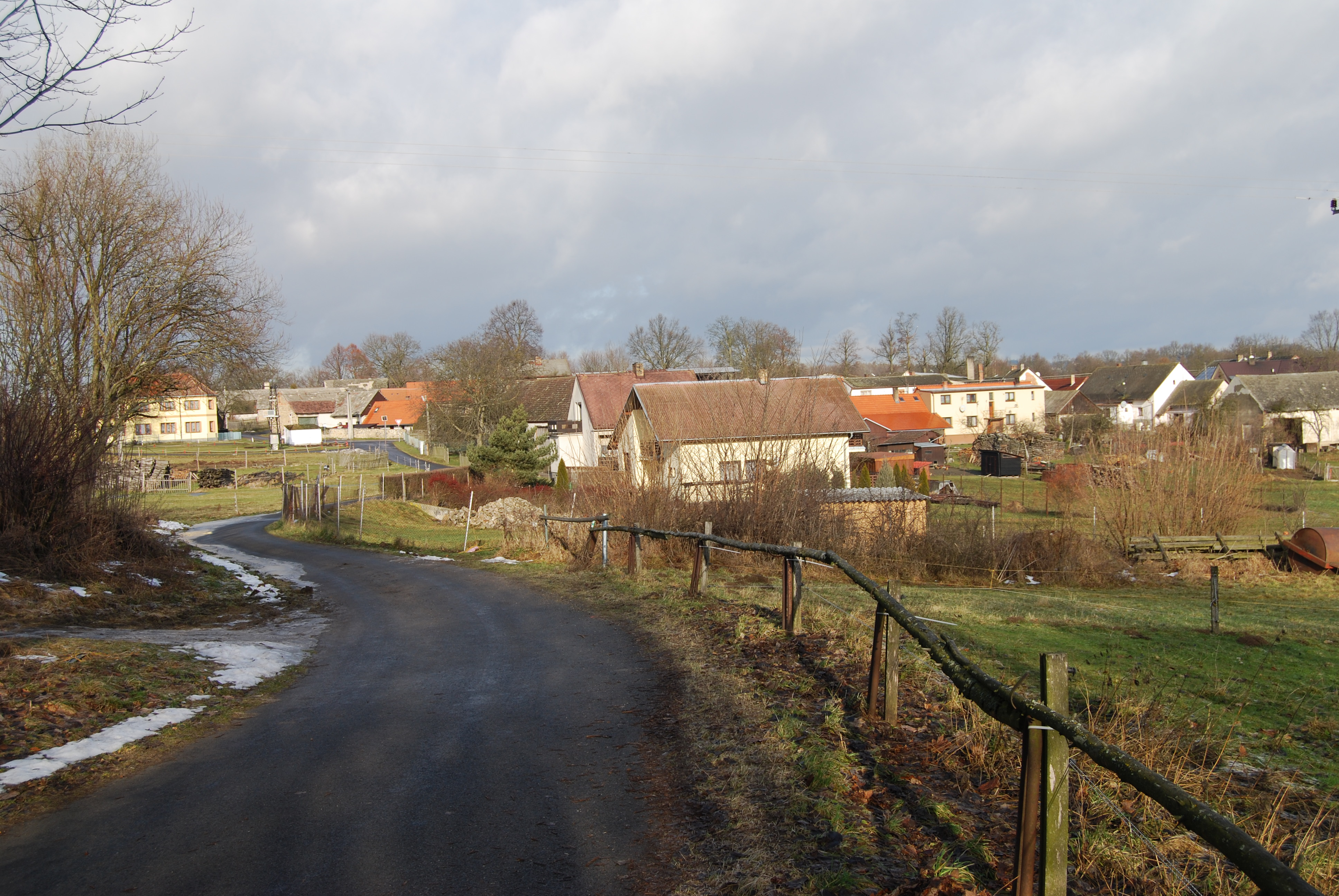 Pohled na část obce z komunikace od Mlčkova. Přeštěnice. Okres Písek. Česká republika.